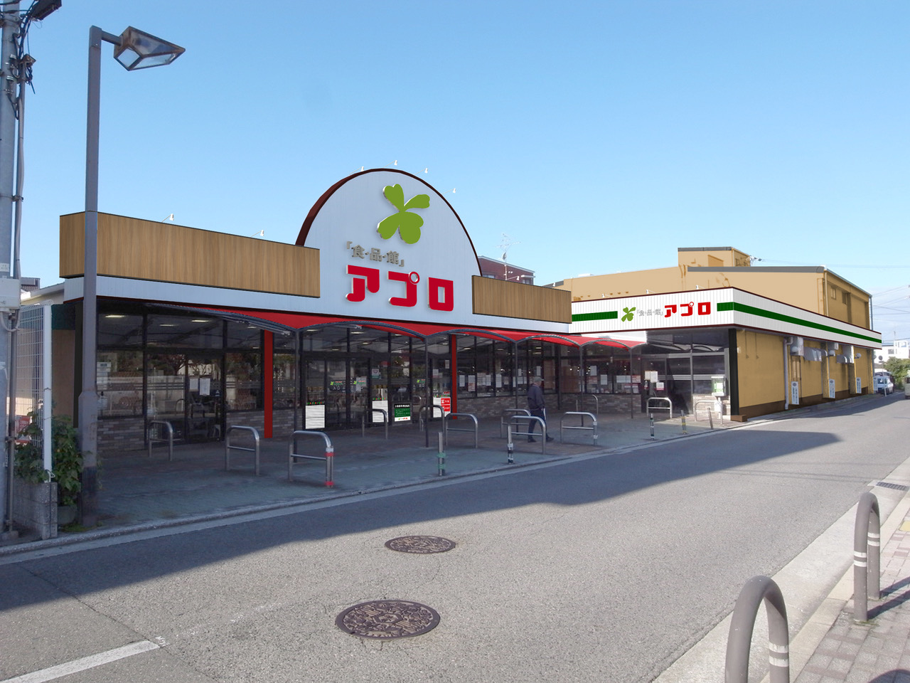 食品館アプロもず店(2020年2月オープン)